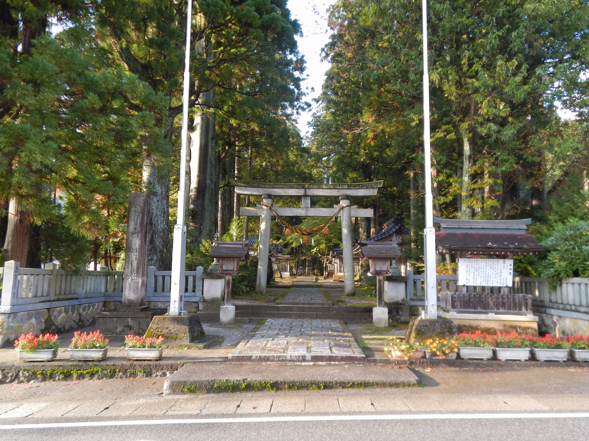 Ashikuraji, Tateyama, Nakaniikawa District, Toyama Prefecture 930-1406, Japan